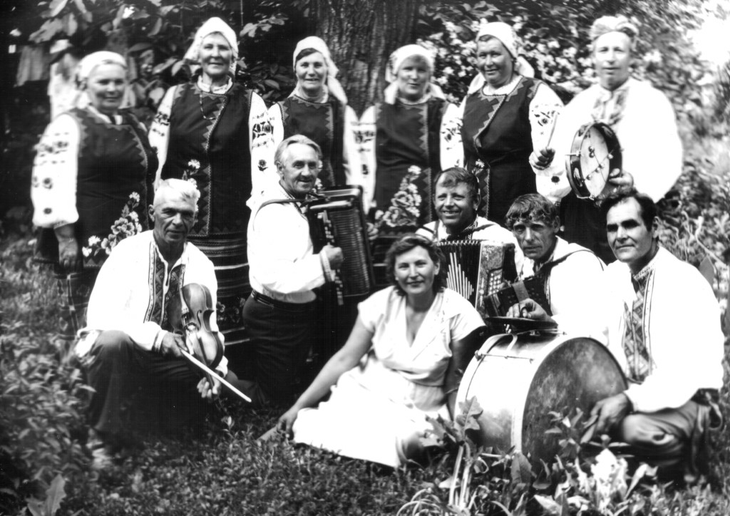 Учасники самодіяльності